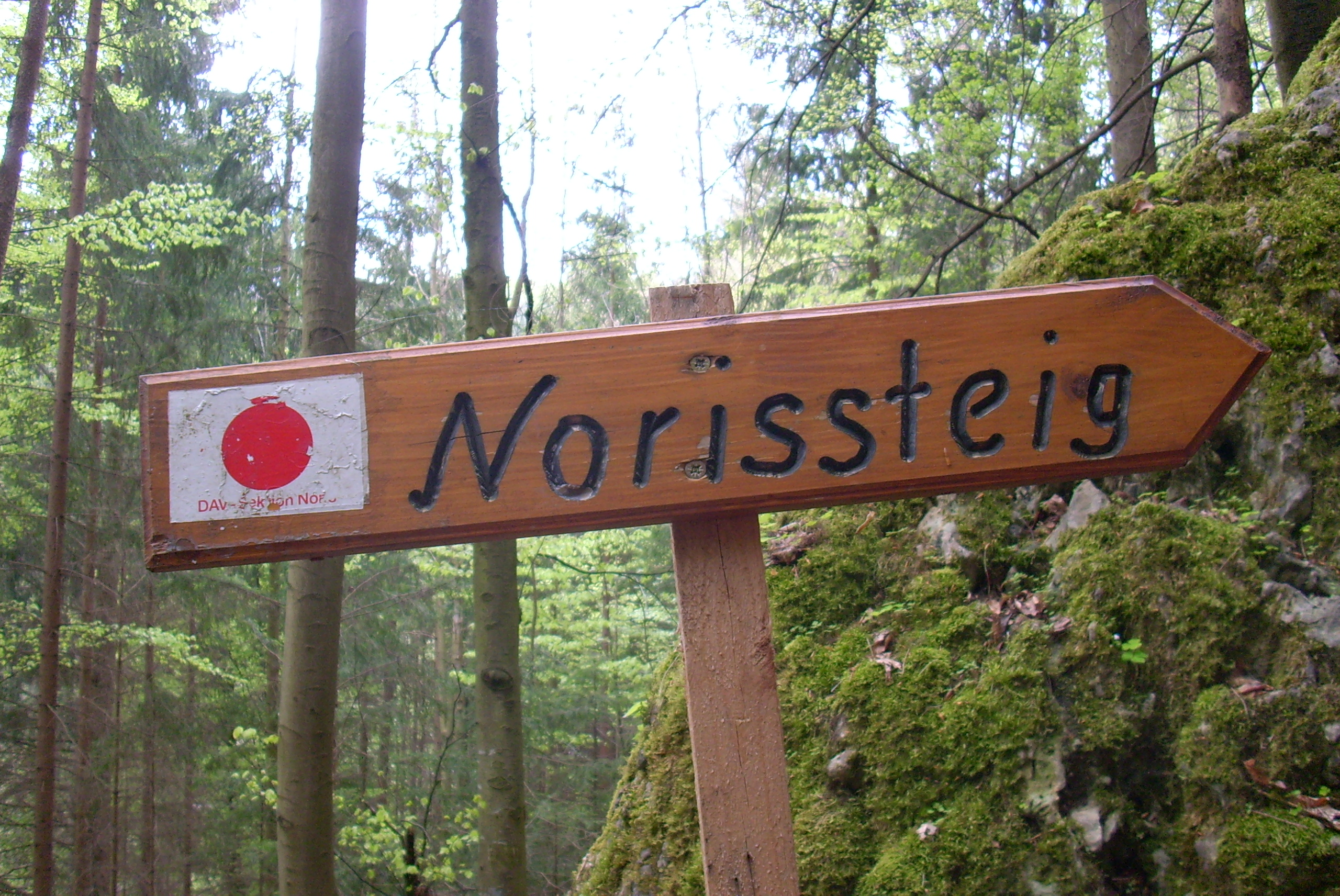 Wegweiser zum Norissteig, roter Punkt